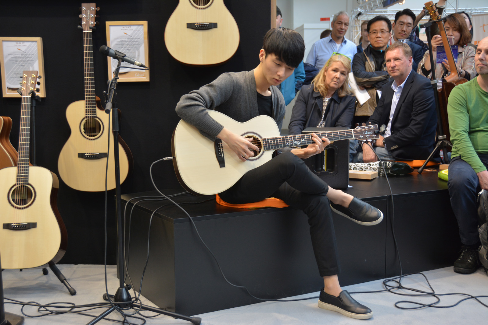 Sungha Jung auf der Musikmesse Frankfurt während einer Performance am Stand von Lakewood Guitars